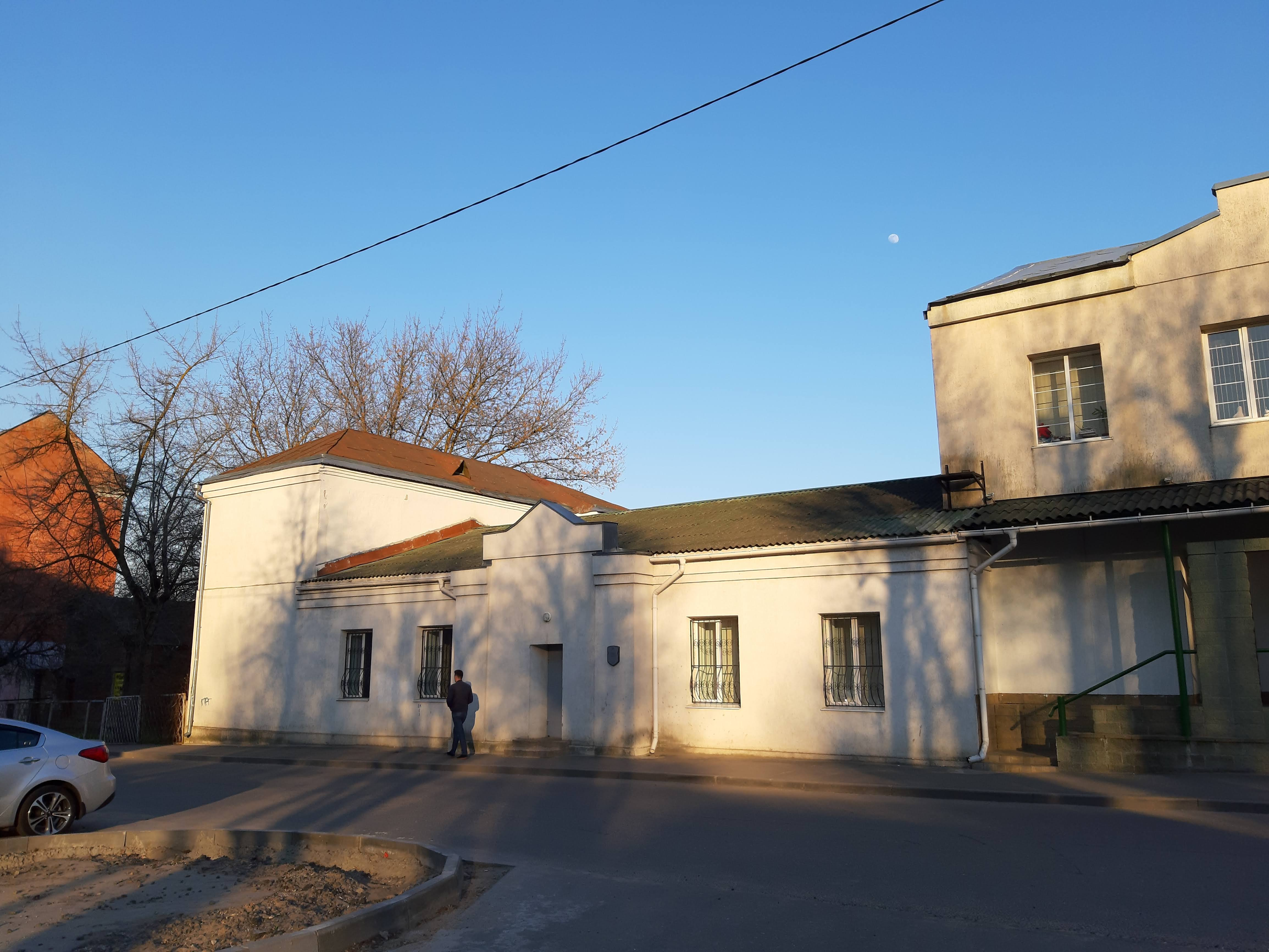 Магілёў. Вуліца Мянжынскага